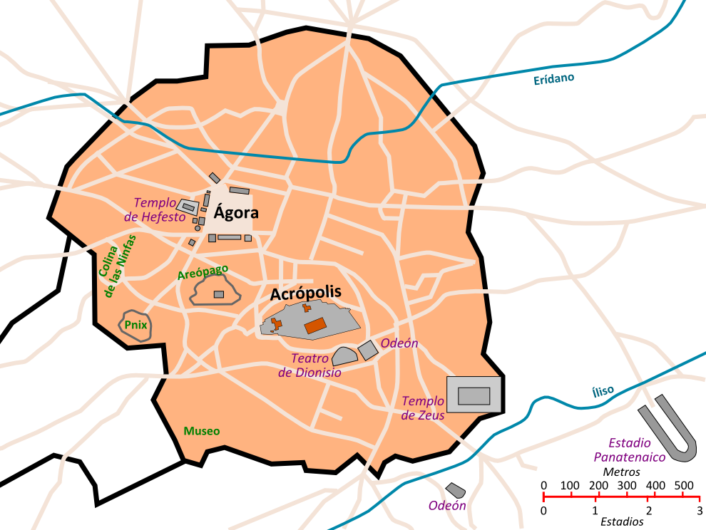 Plànol d'Atenes en època clàssica, al voltant del 430 a. C.